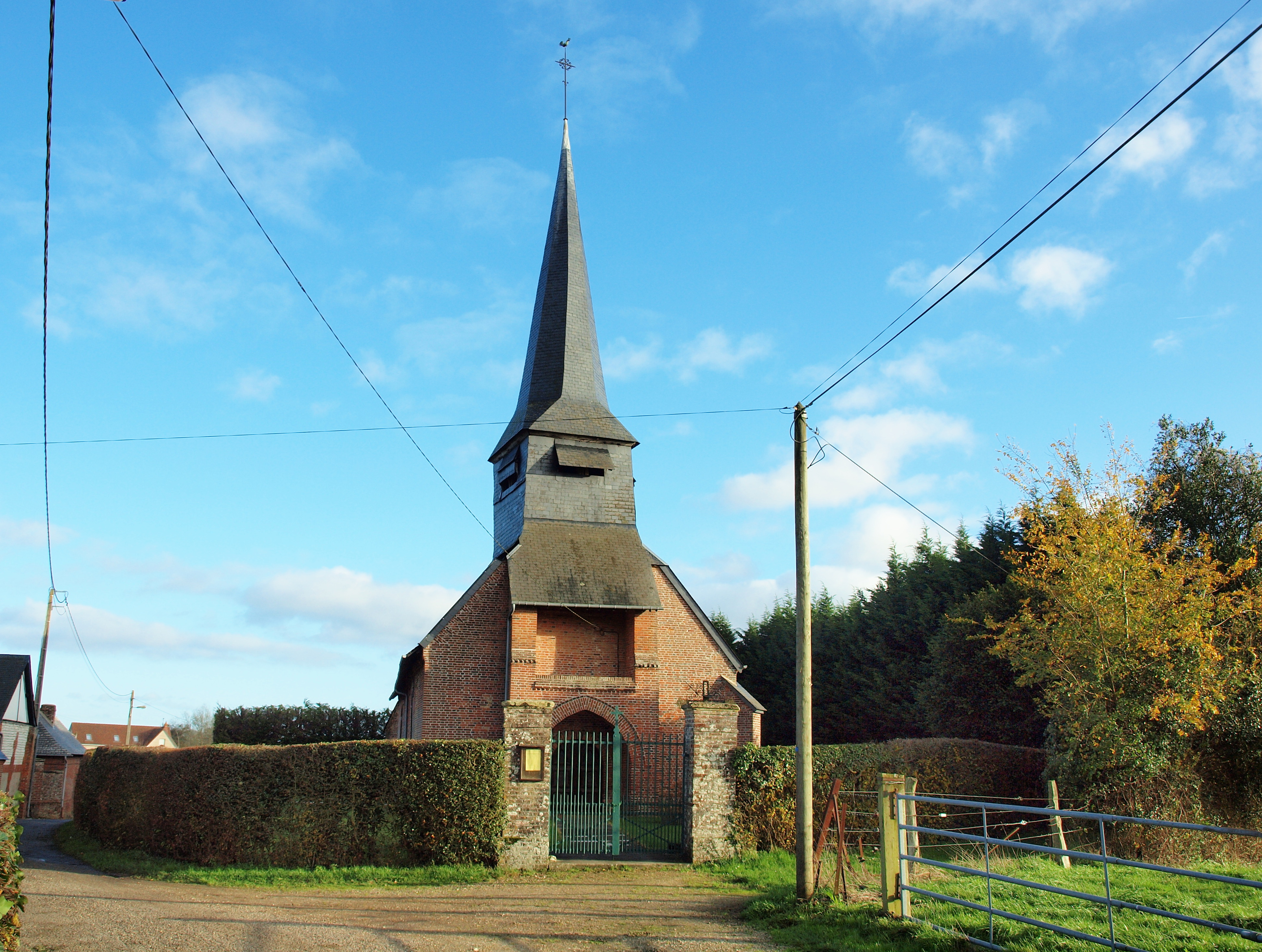 Saint-Martin-au-Bosc (Seine-Maritime, France)